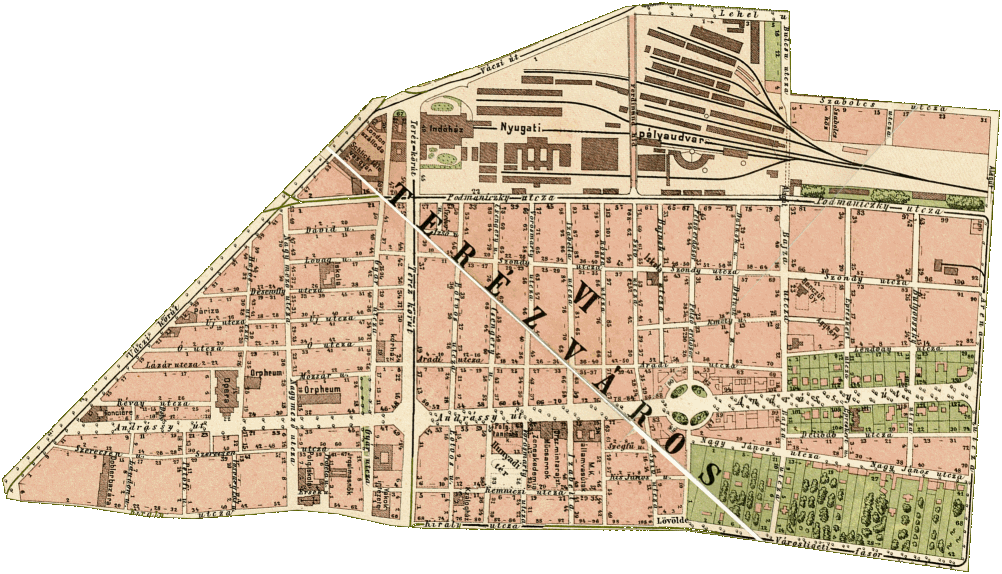 Homolka József 1893-as Budapest térképe alapján. Budapest, Terézváros (VI. ker)